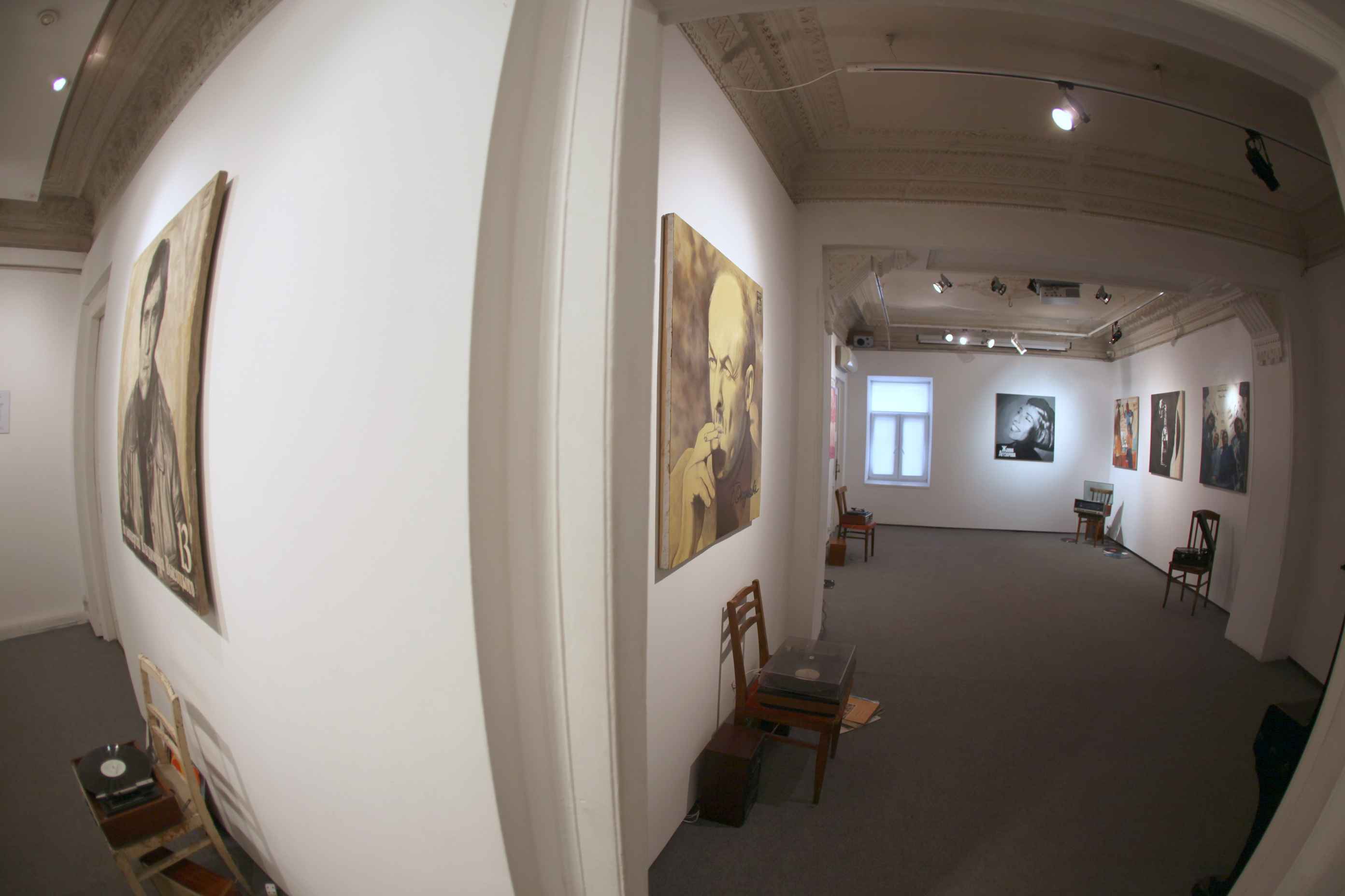 "Платівки", 2013